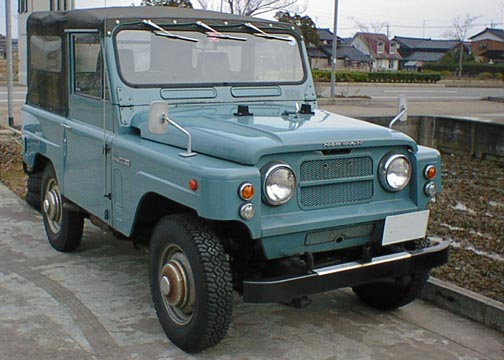 1971年式日産パトロール60型